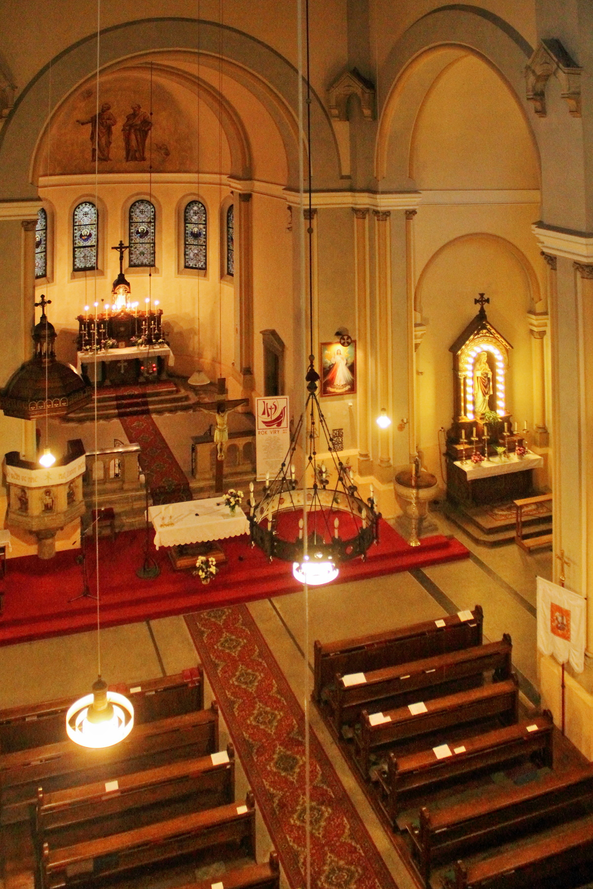 Kostel sv. Petra a Pavla (Semily), Komenského nám., Semily